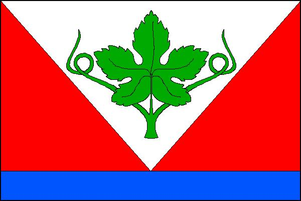 Vlajka obce Lozice